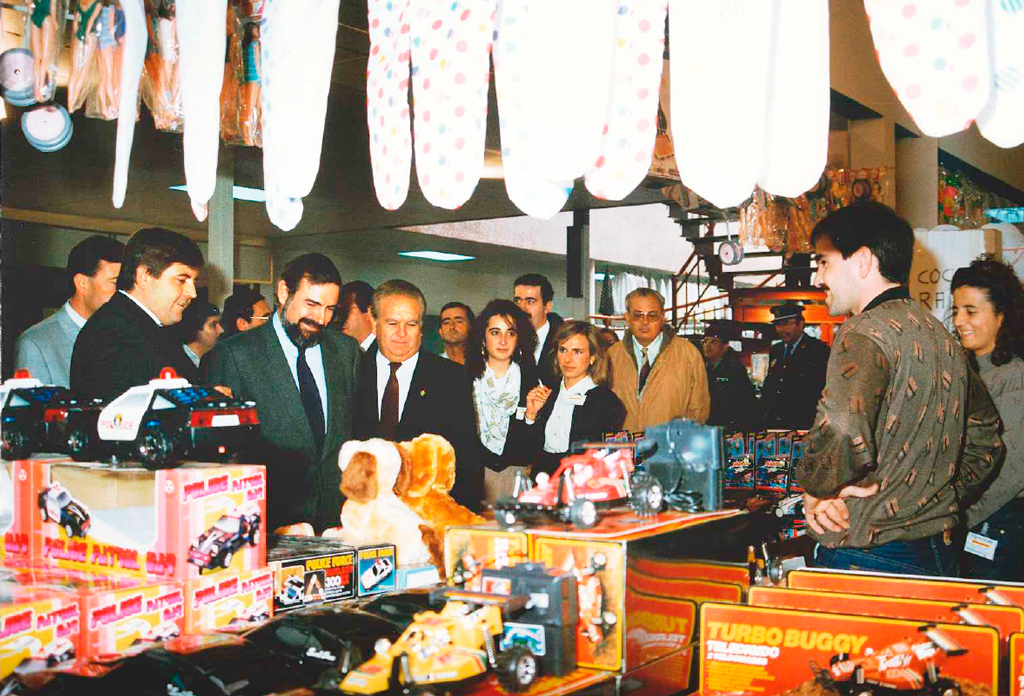 Inicios de Juguetilandia